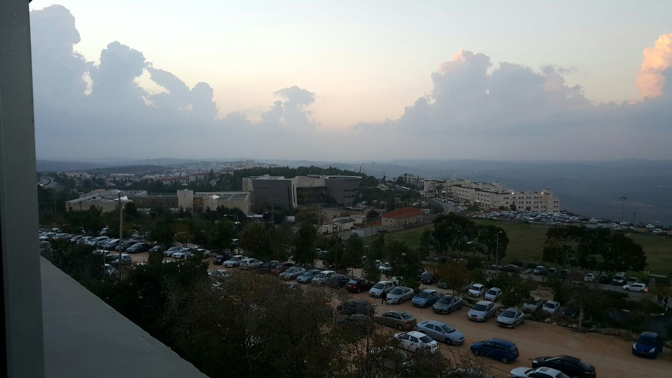 אריאל